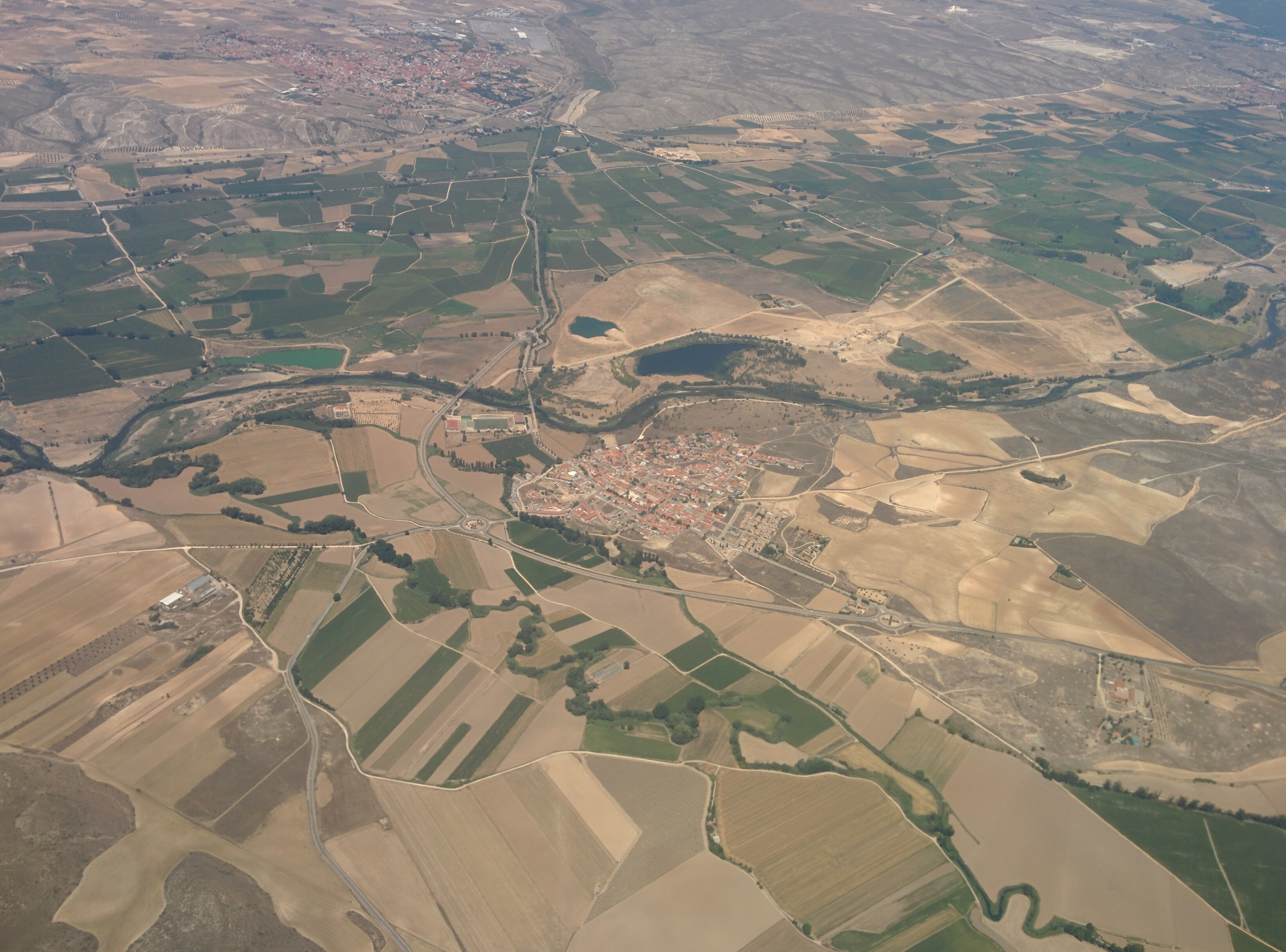 Vista aérea de Titulcia, en Madrid (España).